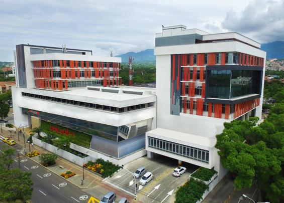 Fachada de Unicentro Cali sobre la Calle 13, también conocida como Avenida Pasoancho.